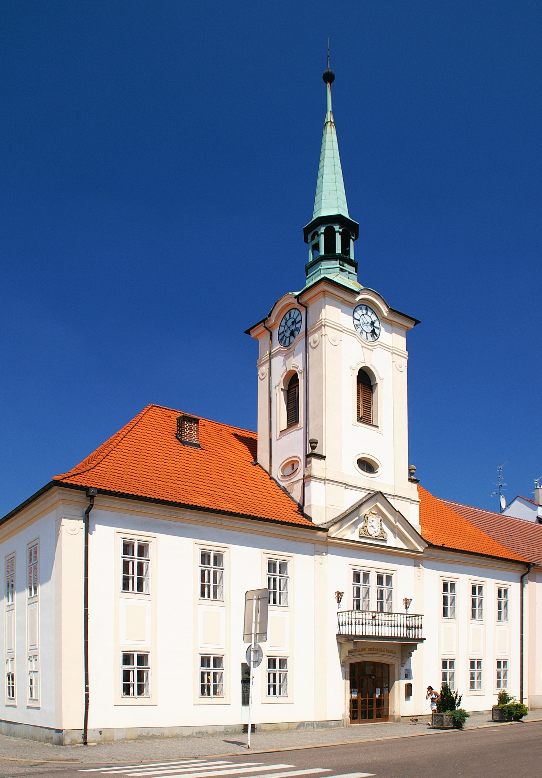 Kostelec nad Orlicí, Stará radnice na Palackého náměstí